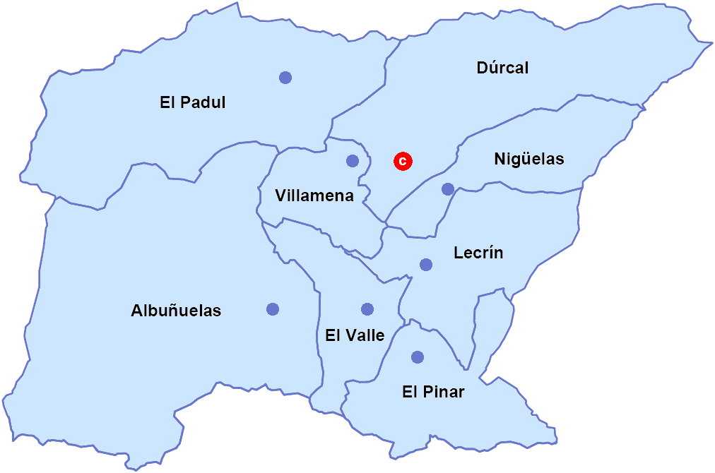 Mapa de la comarca del Valle de Lecrín, en la provincia de Granada (España).